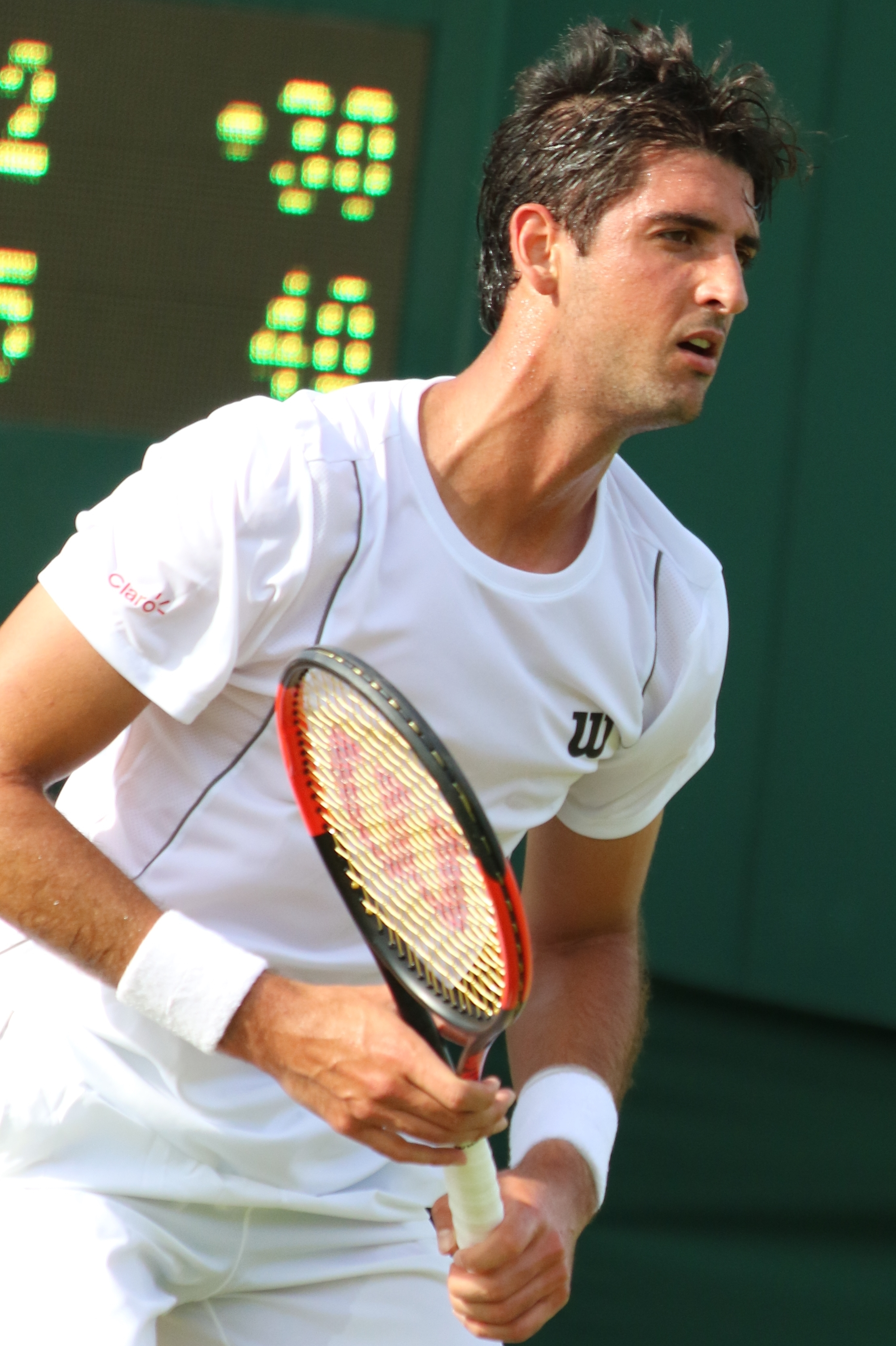 Bellucci WM17 (7)